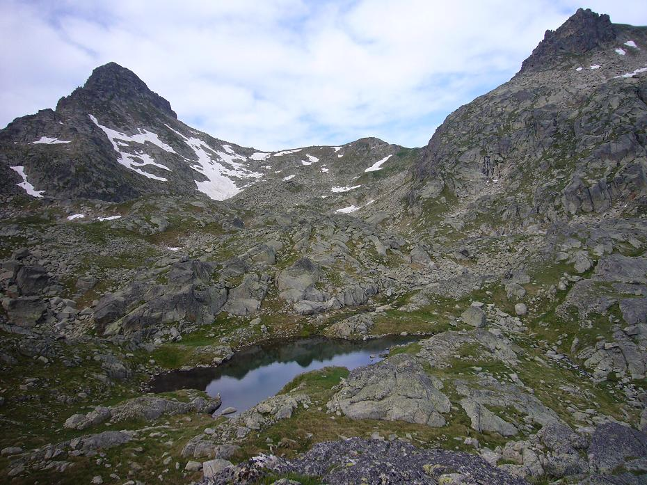 Port de Caldes vist des del Pòrt de Ribereta; Naut Aran, Vall d'Aran, Catalunya